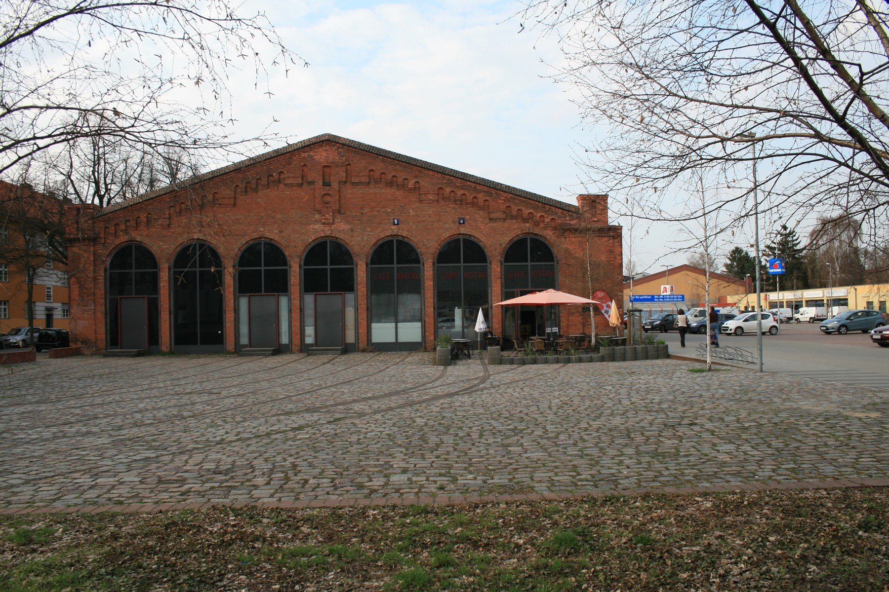 Berlin-Reinickendorf, Pankower Allee 47-51. Verwaltungsgebäude und Wagenhalle des Straßenbahnbetriebshofes Reinickendorf.